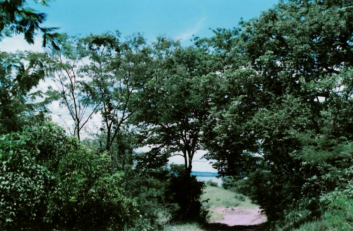 Descrição: A Cascalheira, em Três Lagoas, Mato Grosso do Sul, Brasil, é uma área onde a Mata Altântica começa a ceder lugar ao Cerrado. Fotografia tirada em 2007.